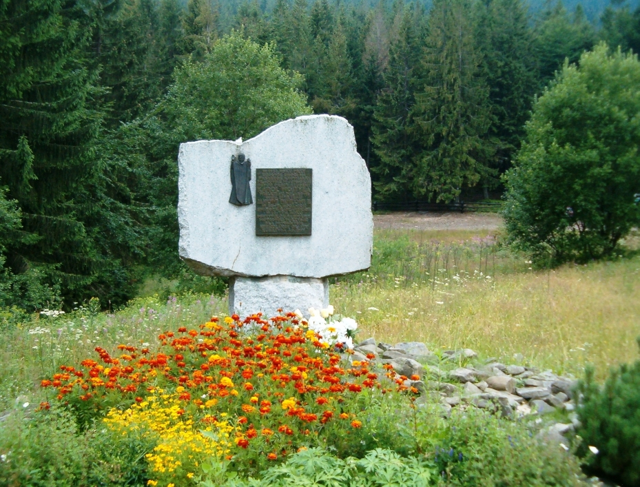 Obelisk Jana Pawła II na Przełęczy Krowiarki